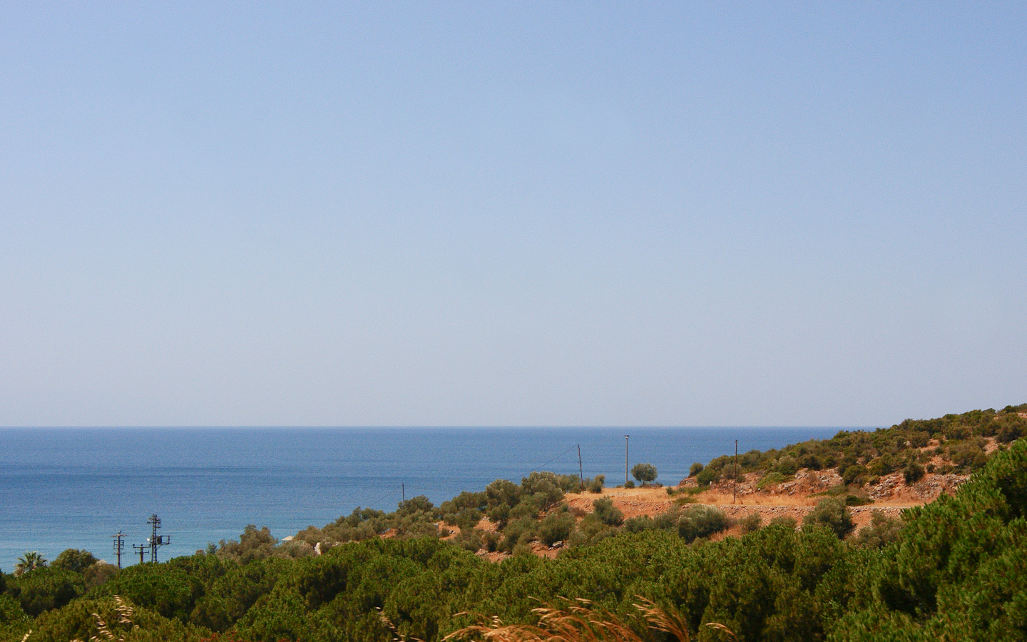 Landschaft von Izmir, Türkei